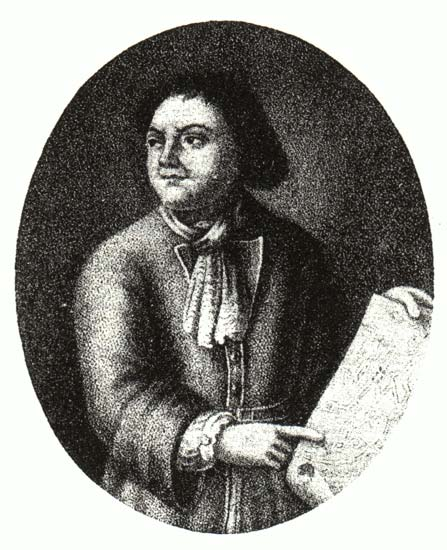 Тиммерман Франц Фёдорович - сподвижник Петра I